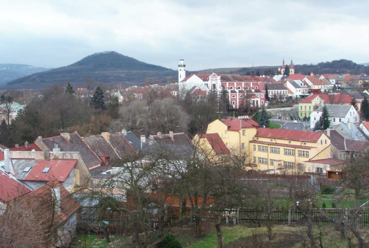 Klášterec nad Ohří, left ruins of Castle Šumná